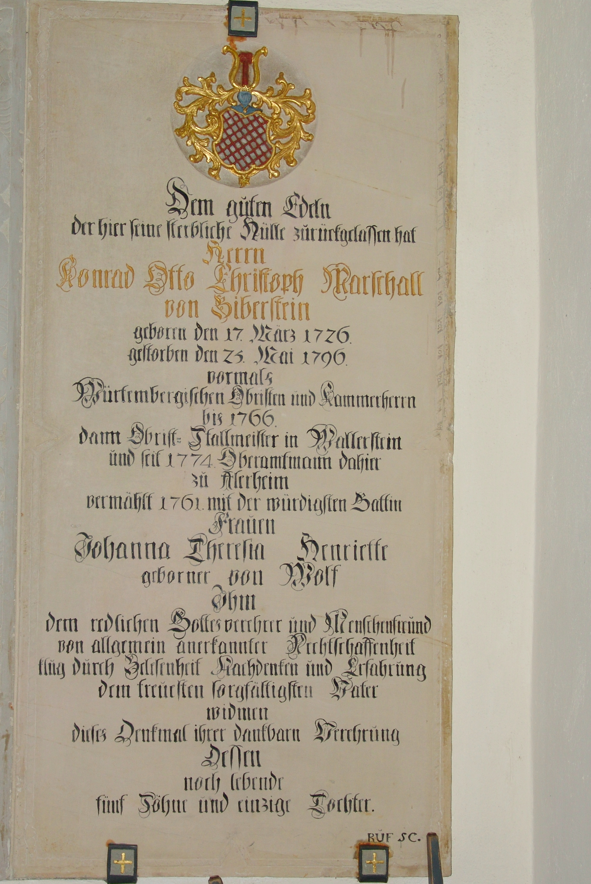 Evangelisch-lutherische Pfarrkirche St. Stephanus in Alerheim, Epitaph für Konrad Otto Christoph Marschall von Biberstein, geboren am 17. März 1726 und gestorben am 25. Mai 1796, Oberamtmann zu Alerheim (siehe Georg Lill (Hrsg.), Karl Gröber/Adam Horn (Bearb.): Die Kunstdenkmäler von Bayern. Bezirksamt Nördlingen. In: Die Kunstdenkmäler von Bayern. Die Kunstdenkmäler von Schwaben. Bd. I. Bezirksamt Nördlingen. R. Oldenbourg Verlag, München 1938, (Nachdruck: R. Oldenbourg Verlag, München/Wien 1982, ISBN 3-486-50514-9), S. 25)